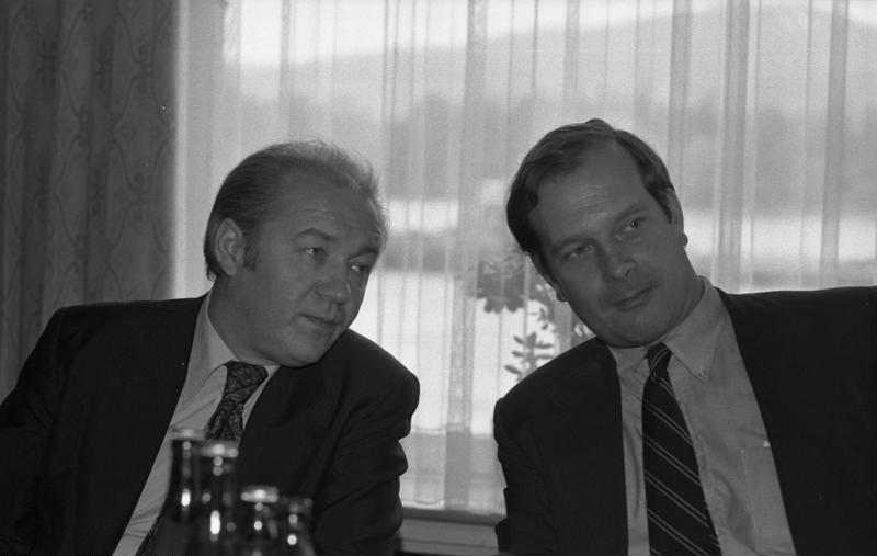 XXII Ordentlicher Kongreß der Europa-Union Deutschland im Rheinhotel Deesen, Bad Godesberg (links: Minister des Bundes Bruno Friedrich, rechts: Minister des Bundes Peter Corterier)